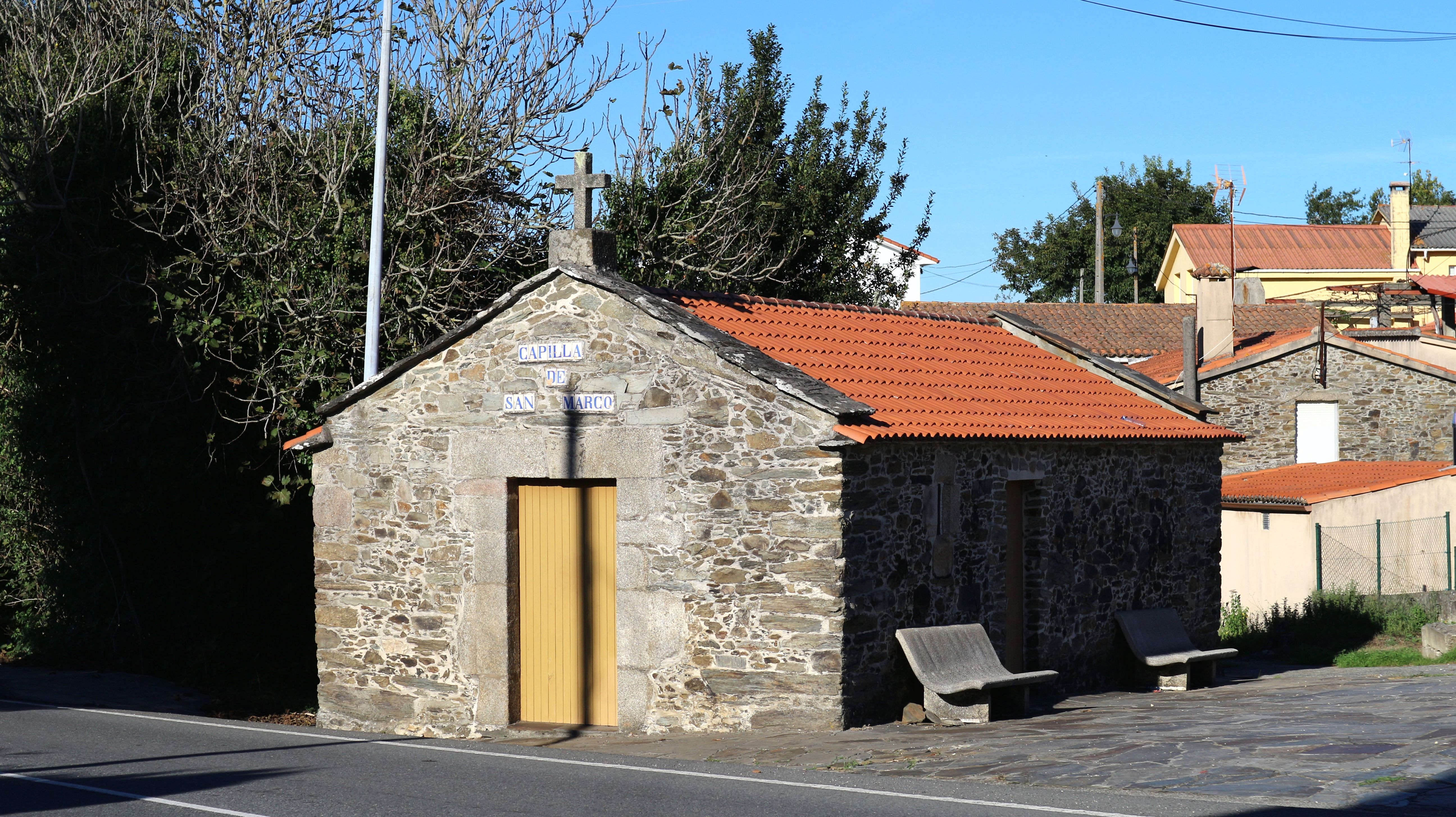 Capela de San Marco. En San Marco, Abegondo (Abegondo).